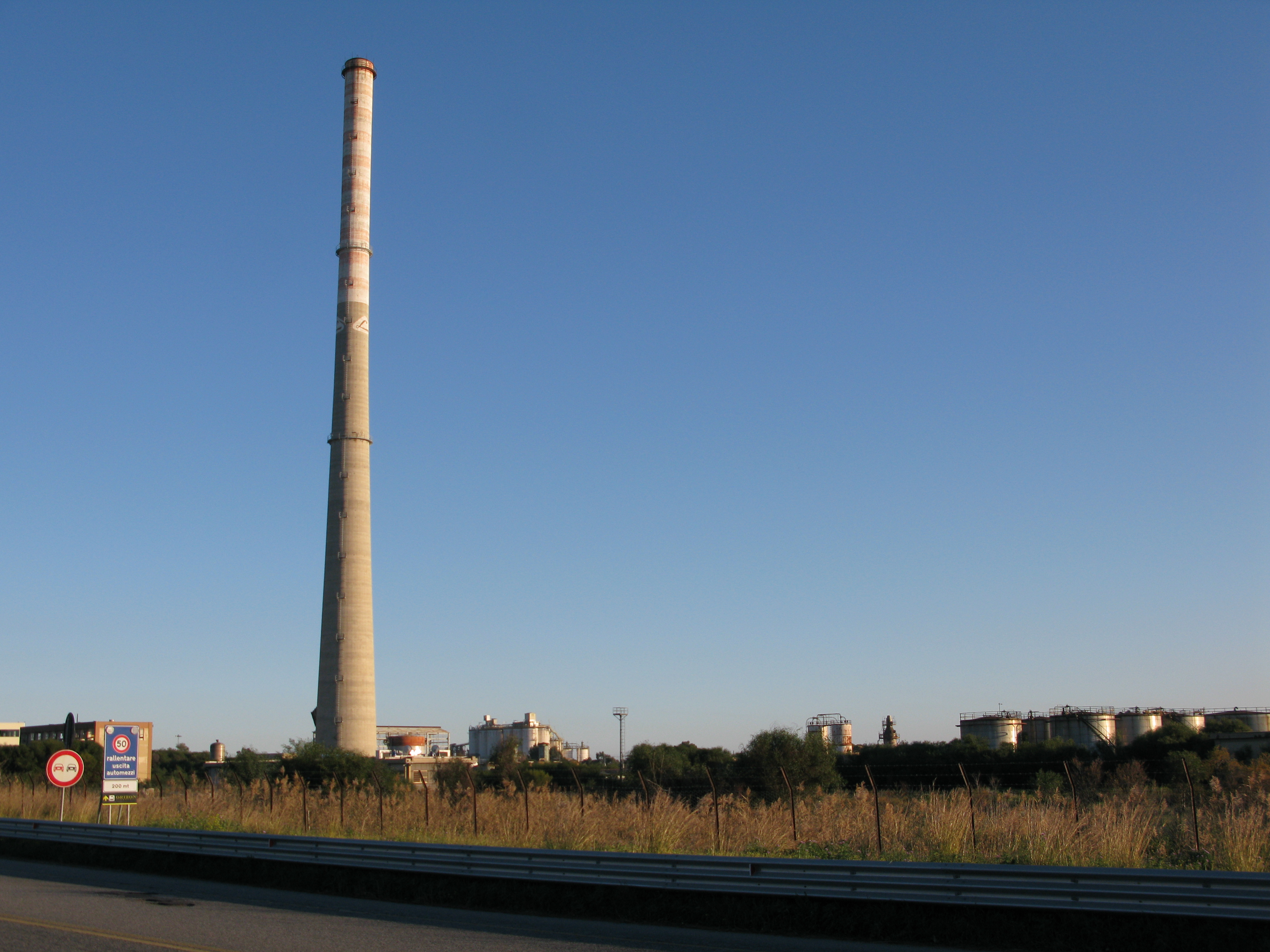 Ciminiera ex Liquichimica Biosintesi (176 m) - Saline Joniche (Montebello Ionico)